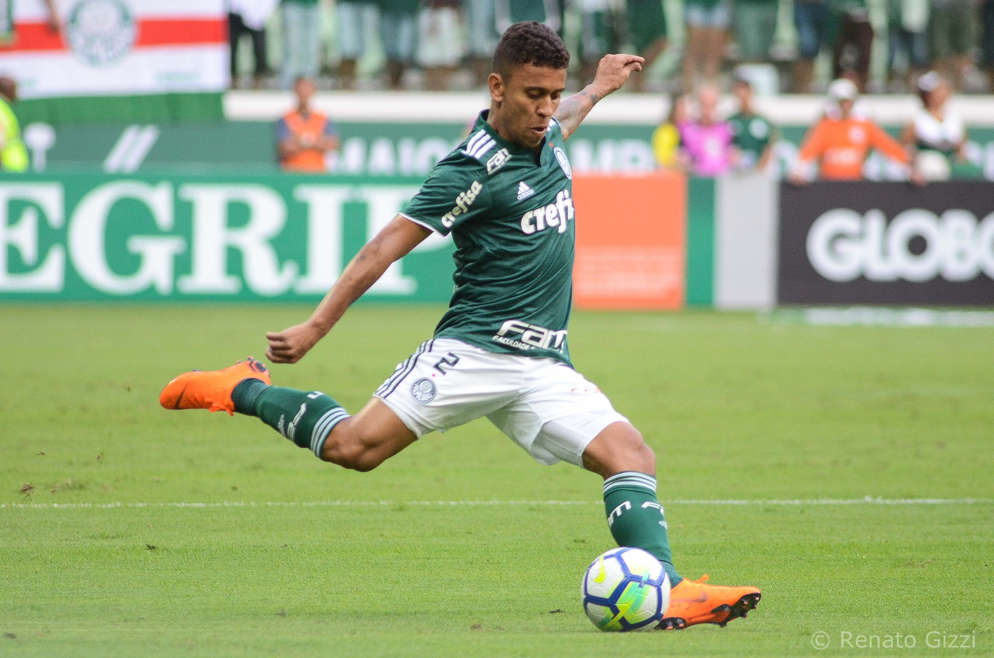 Marcos Rocha no Palmeiras em 2018